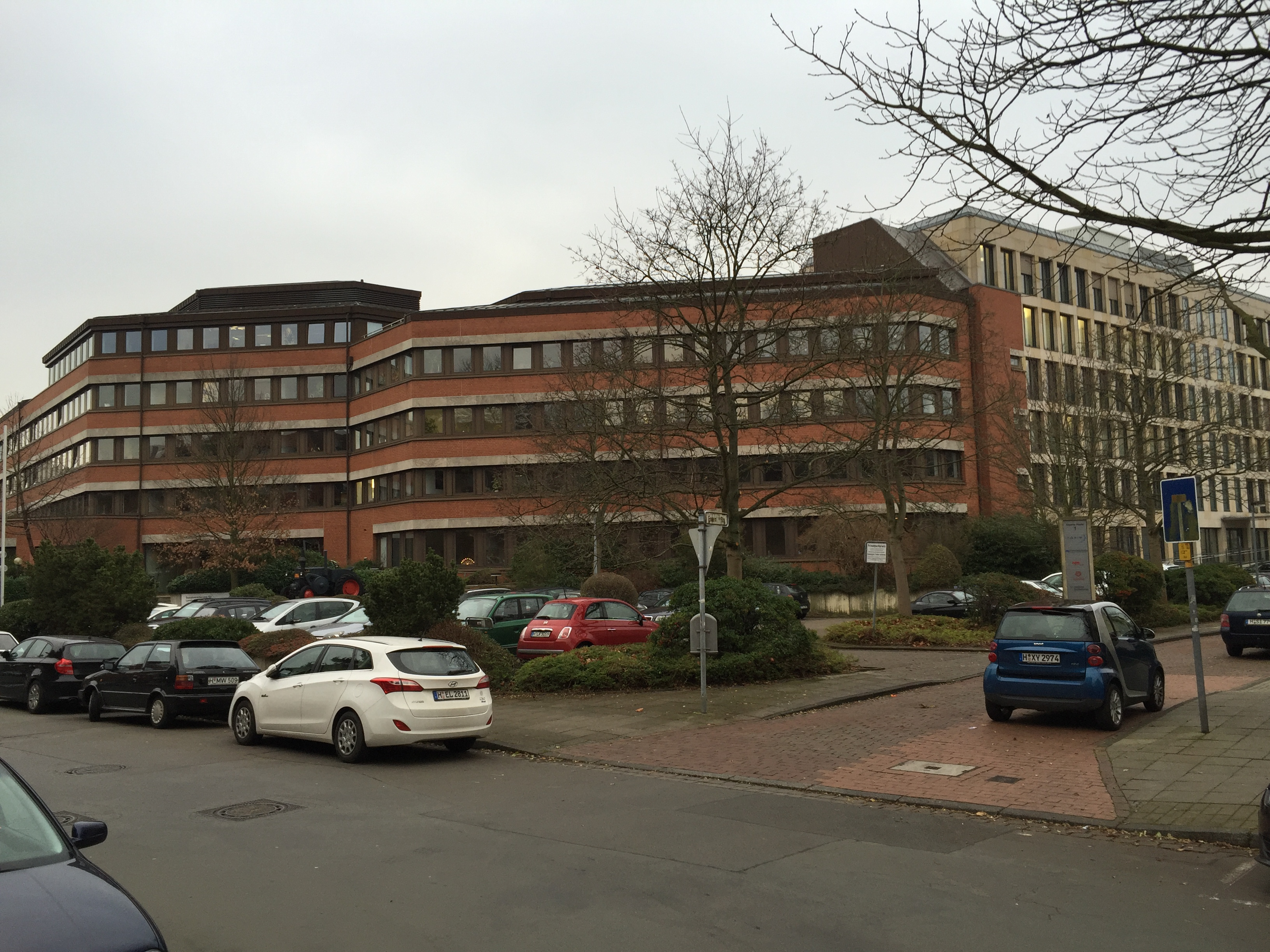 Verwaltungsgebäude SVLFG Hannover